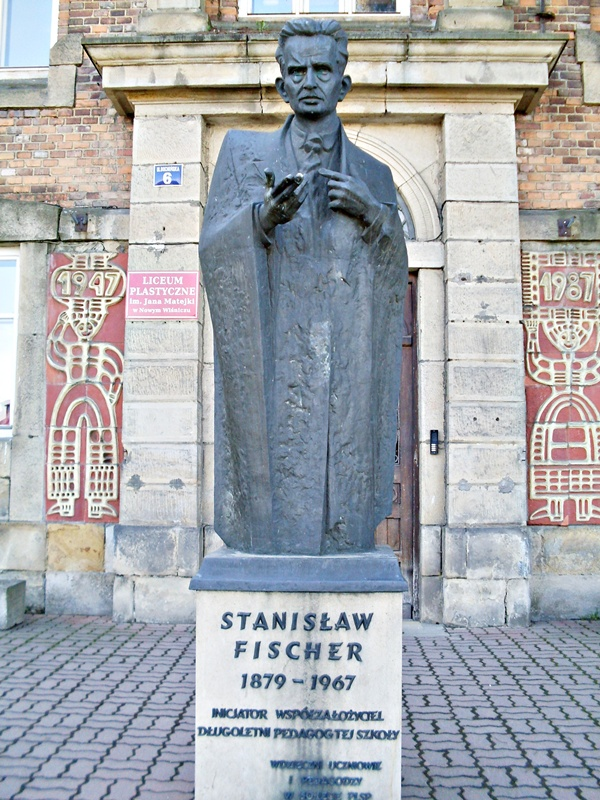 budynek Liceum Sztuk Plastycznych w Nowym Wiśniczu. Pomnik Stanisława Fishera przed wejściem do budynku.